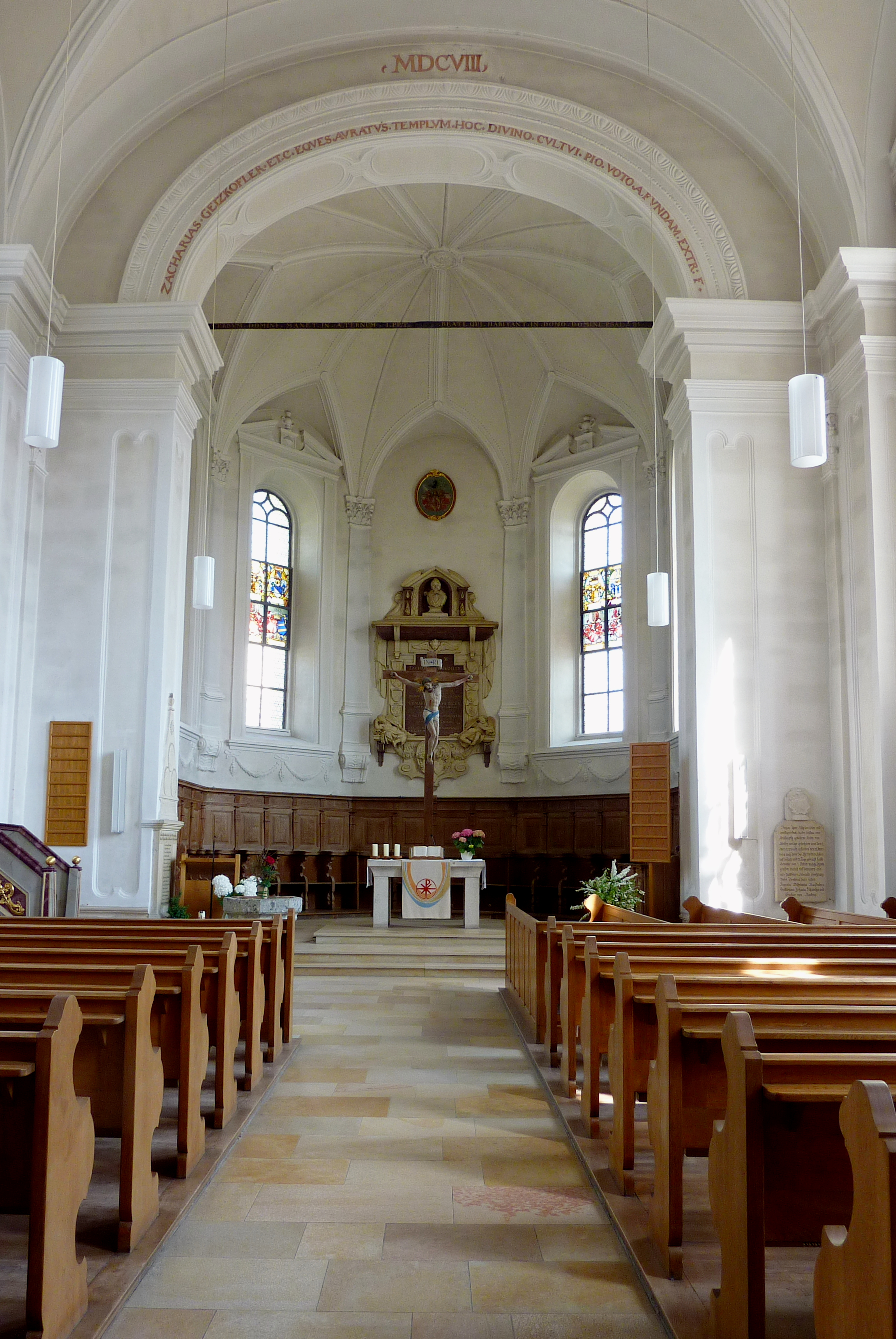 Evangelisch-lutherische Dreifaltigkeitskirche in Haunsheim, einer Gemeinde im Landkreis Dillingen an der Donau (Bayern), Innenraum